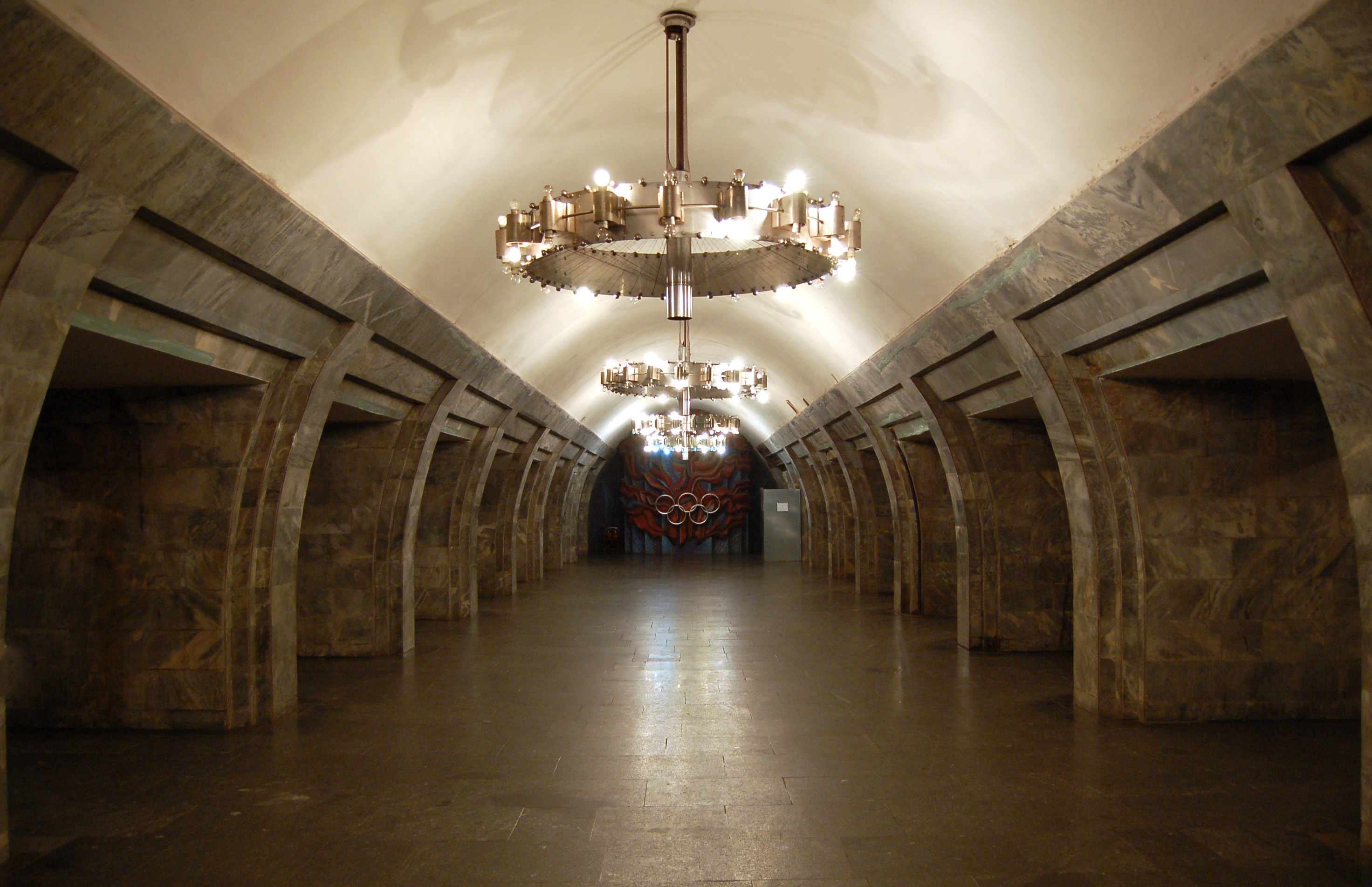 Cтанция метро «Республиканский стадион», центральный зал